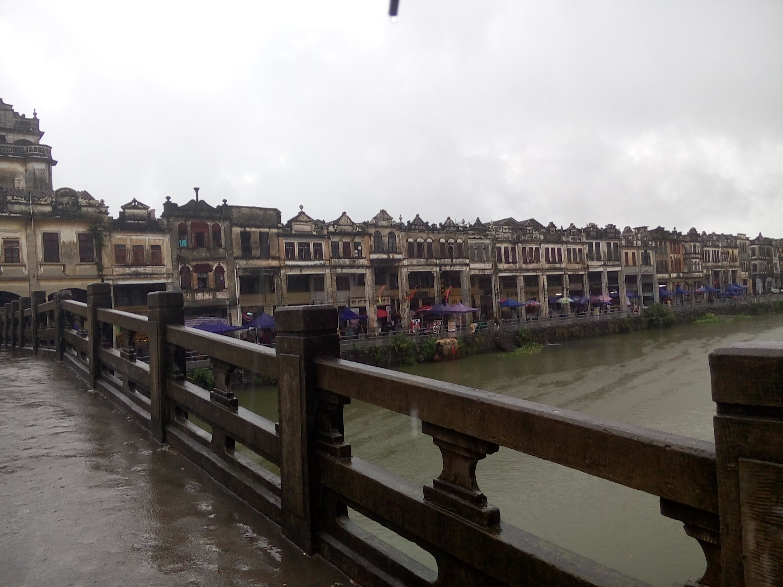 Chikan, Kaiping